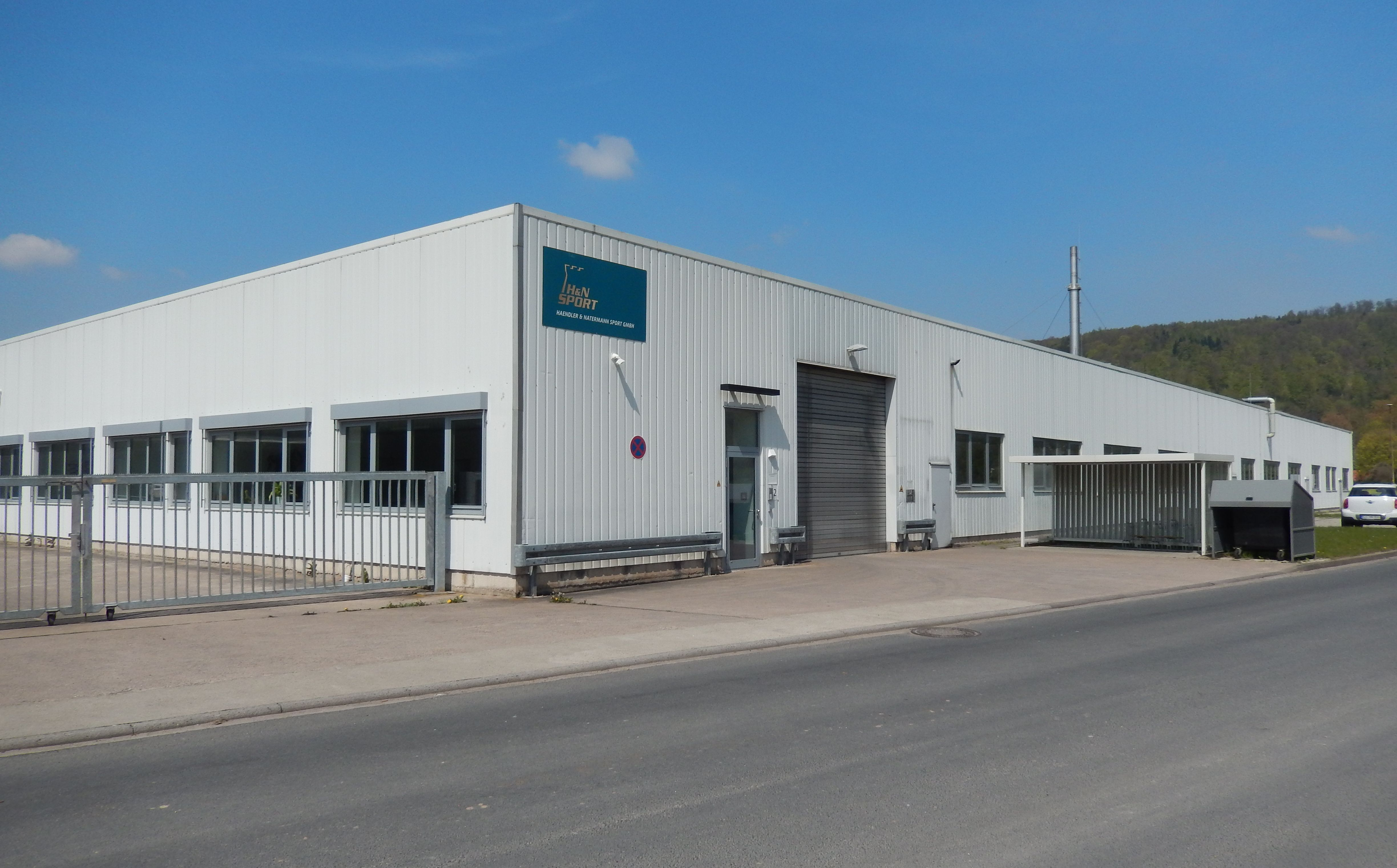 H&N Sport in Volkmarshausen, Niedersachsen